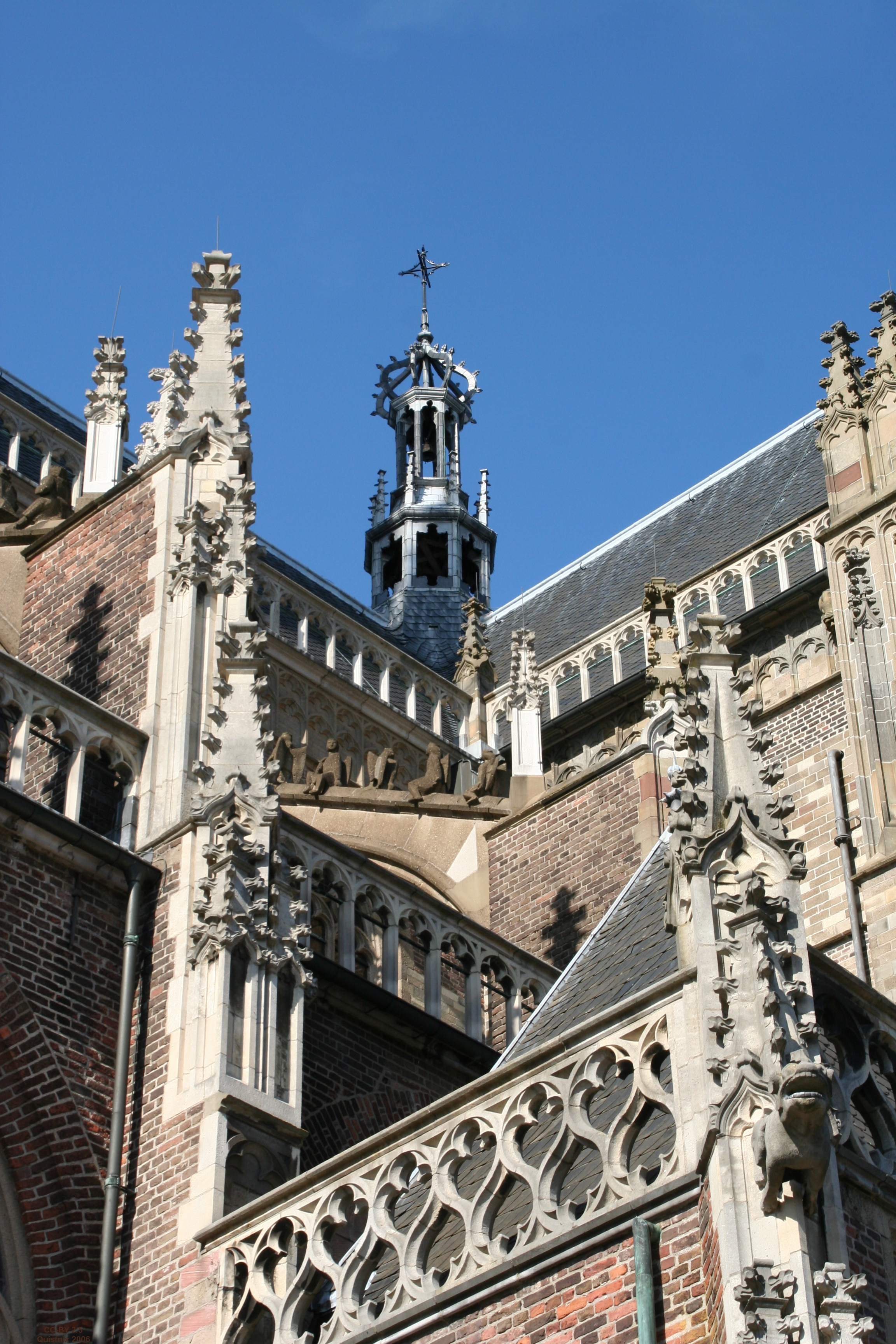 Deel van het uitbundige beeldhouwwerk waarmee de Eusebiuskerk in Arnhem is versierd. Eigen werk.